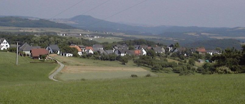 Ortsansicht Dankerath/Eifel